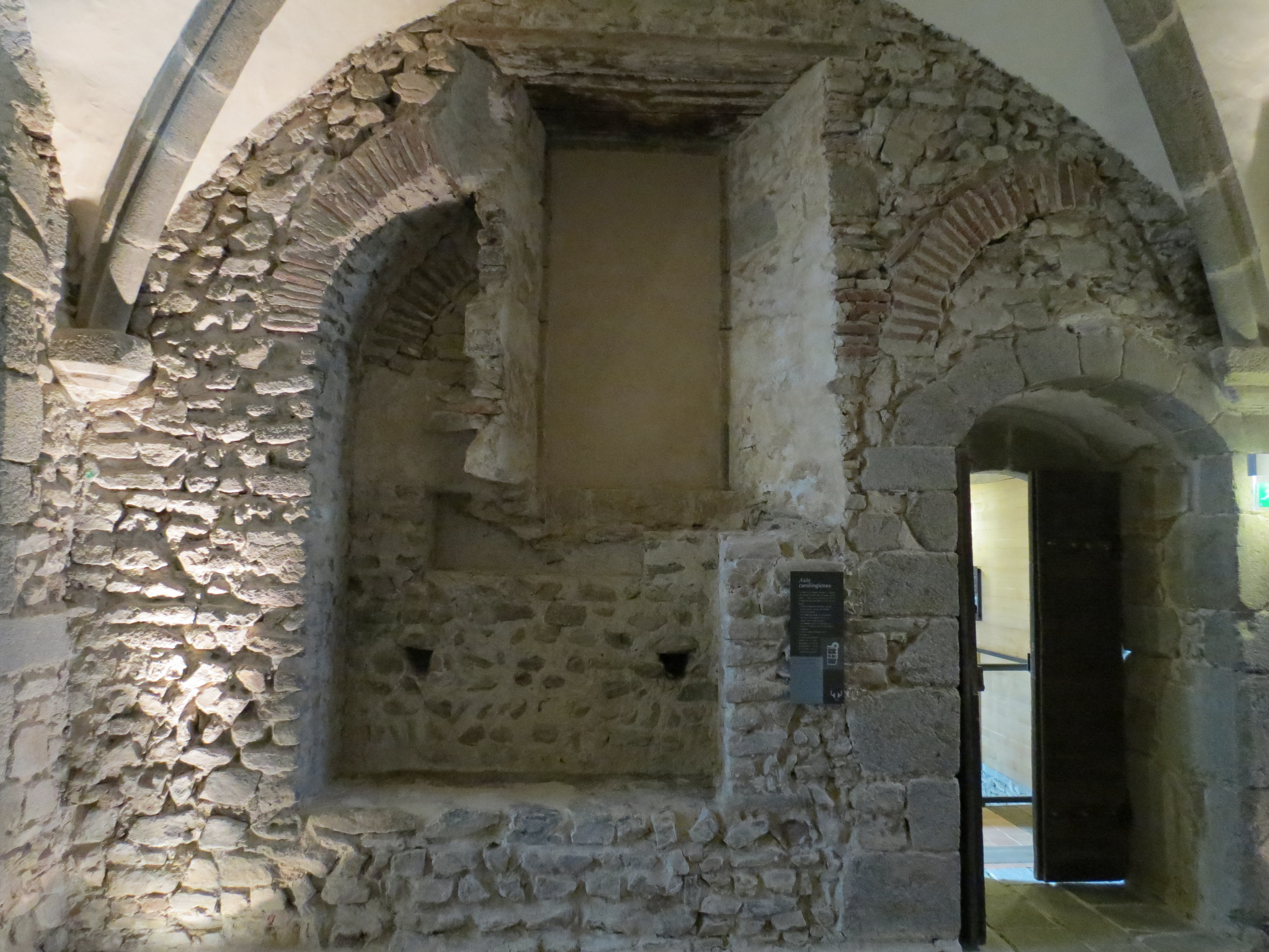 Palais carolingien du château de Mayenne, Pays de la Loire.